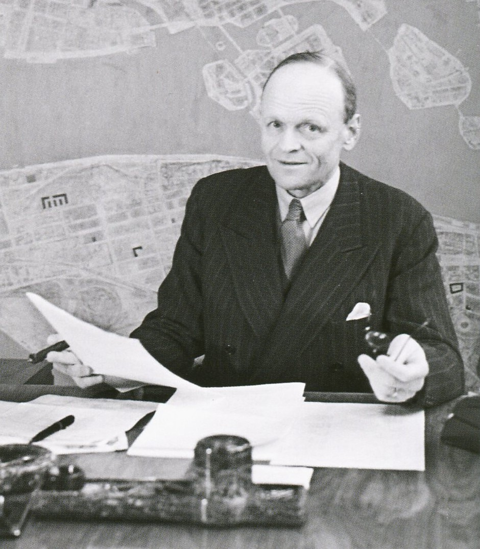 Arkitekt Sven Wallander